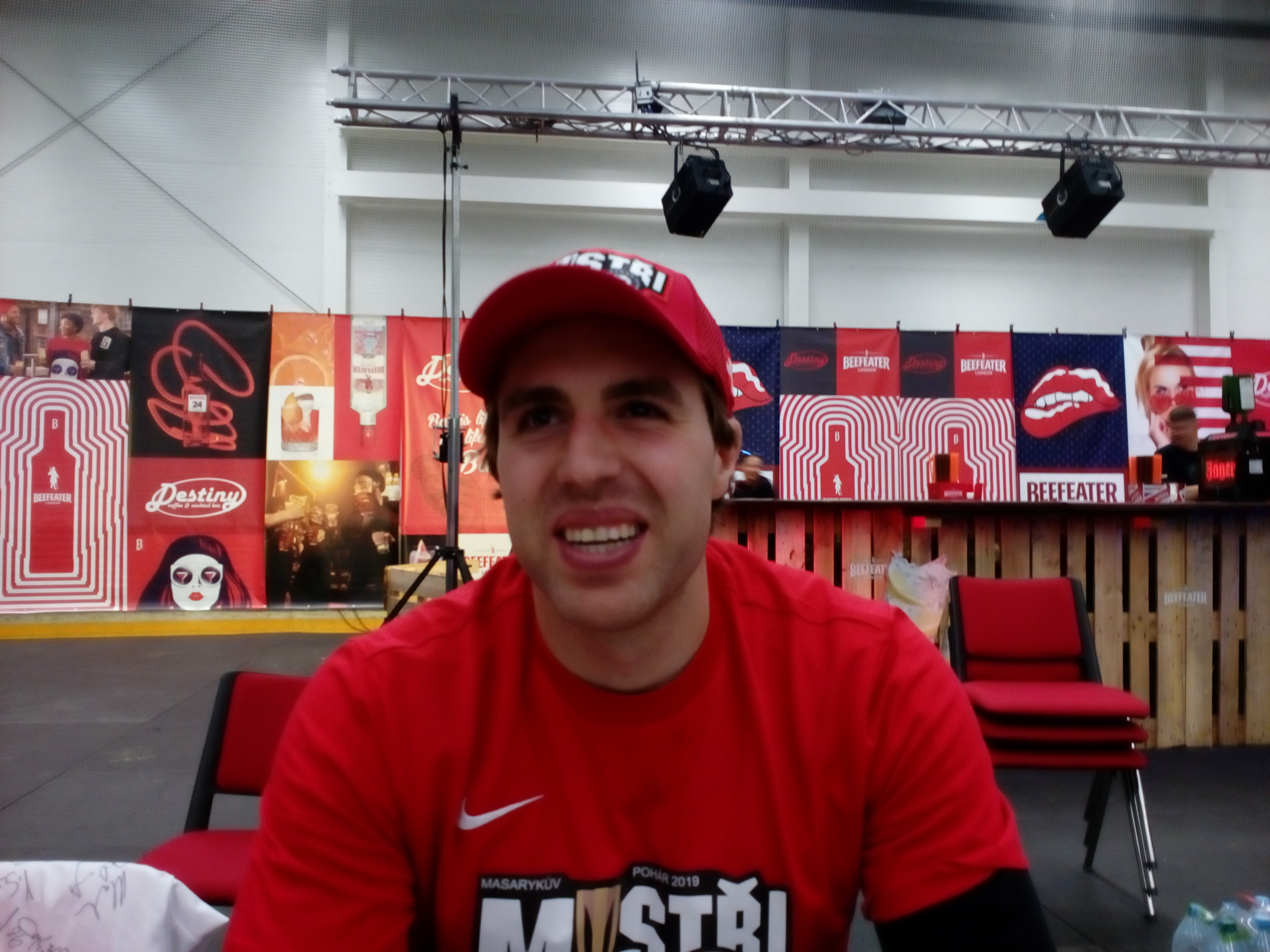 Po zakončení sezóny 2018/19 na autogramiádě v malé (tréningové) Werk Areně